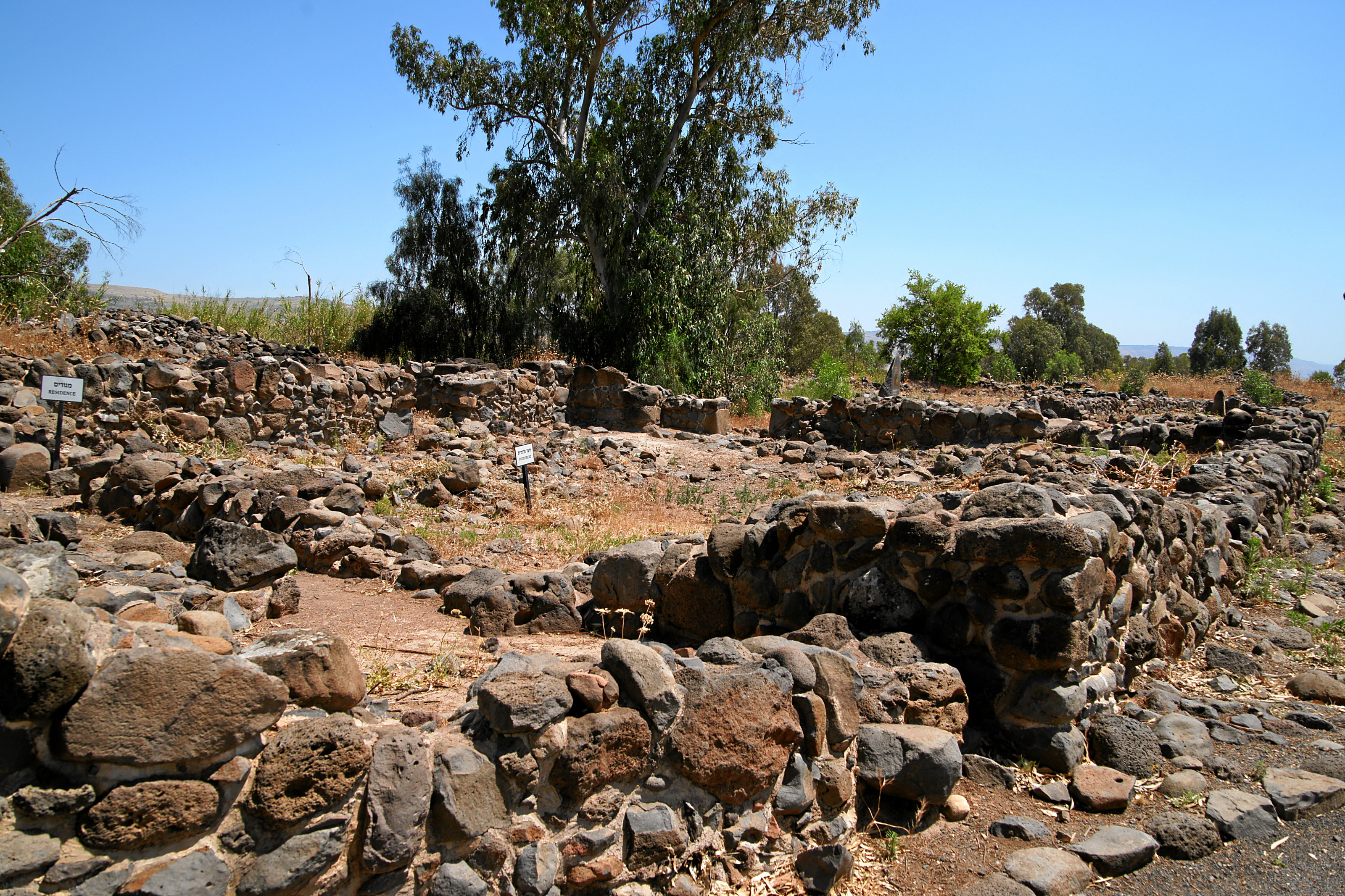 Bethsaida, archäolog. Gelände (Wohngebiet)